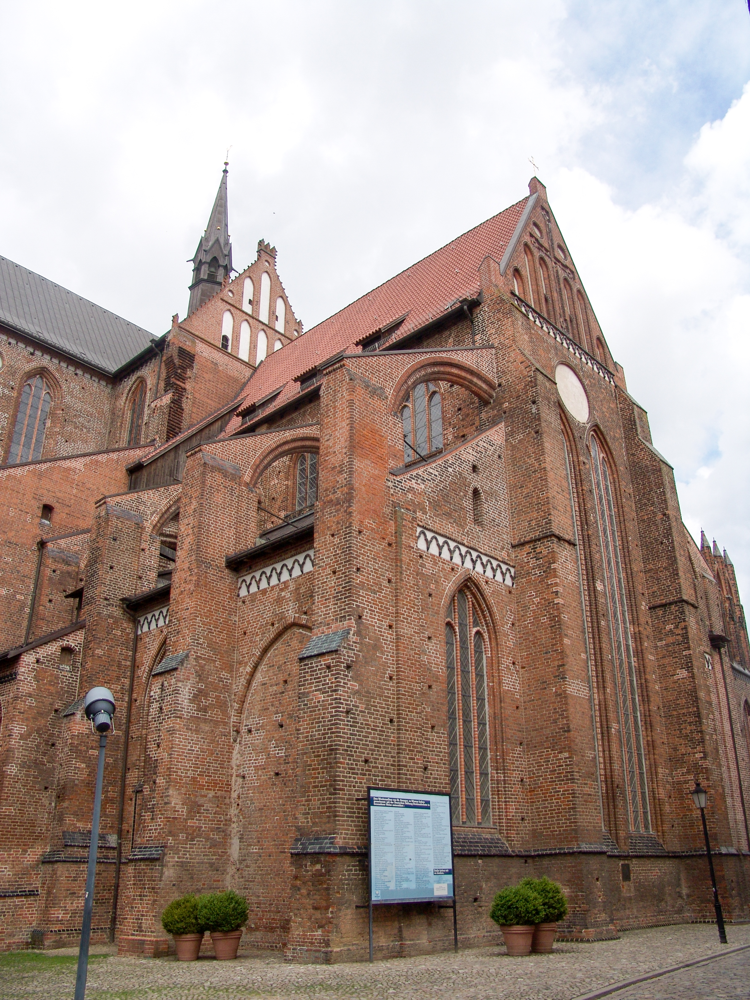 St. Georgen Wismar